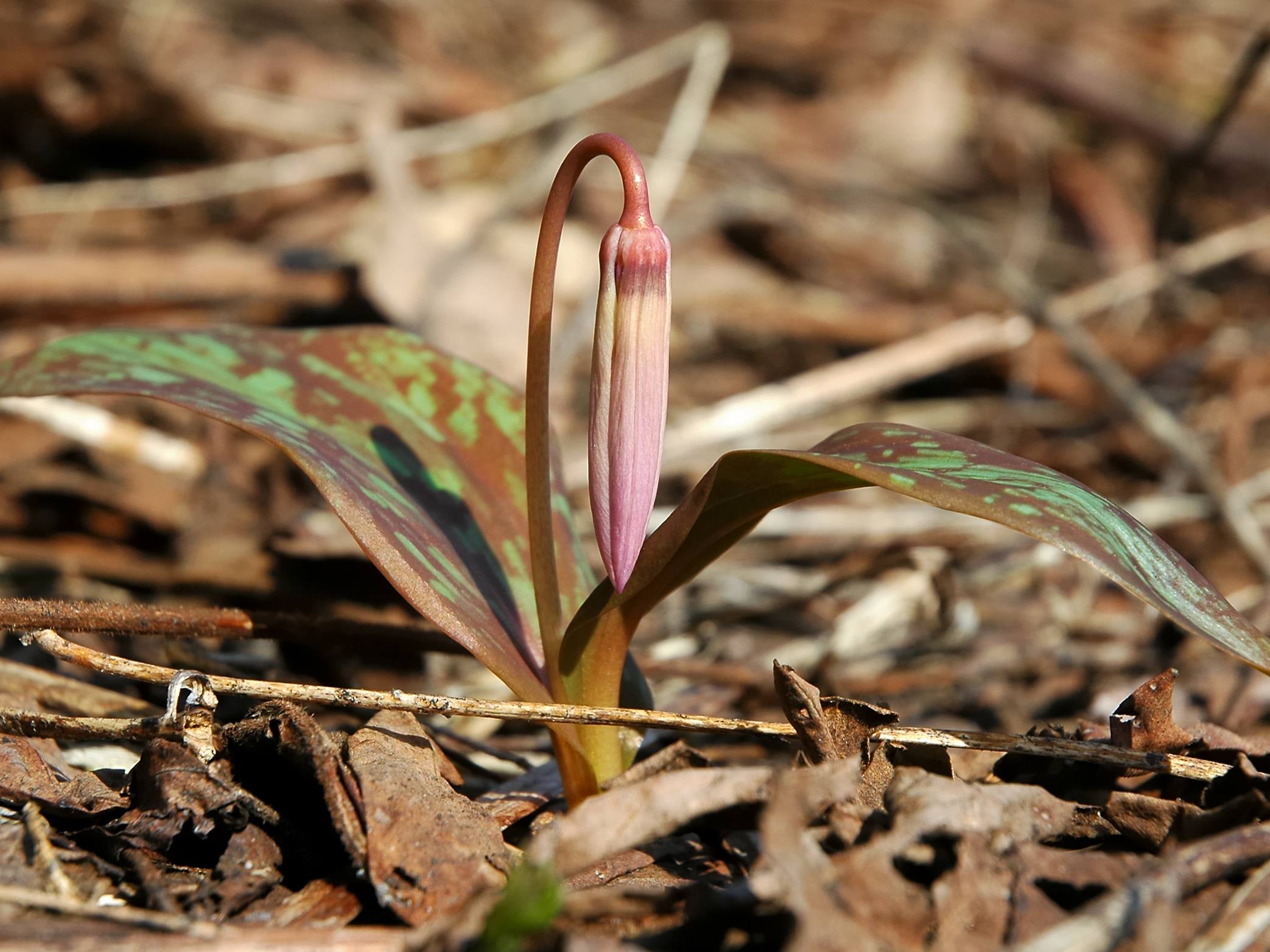 Erythronium japonicum (Katakuri, カタクリ)